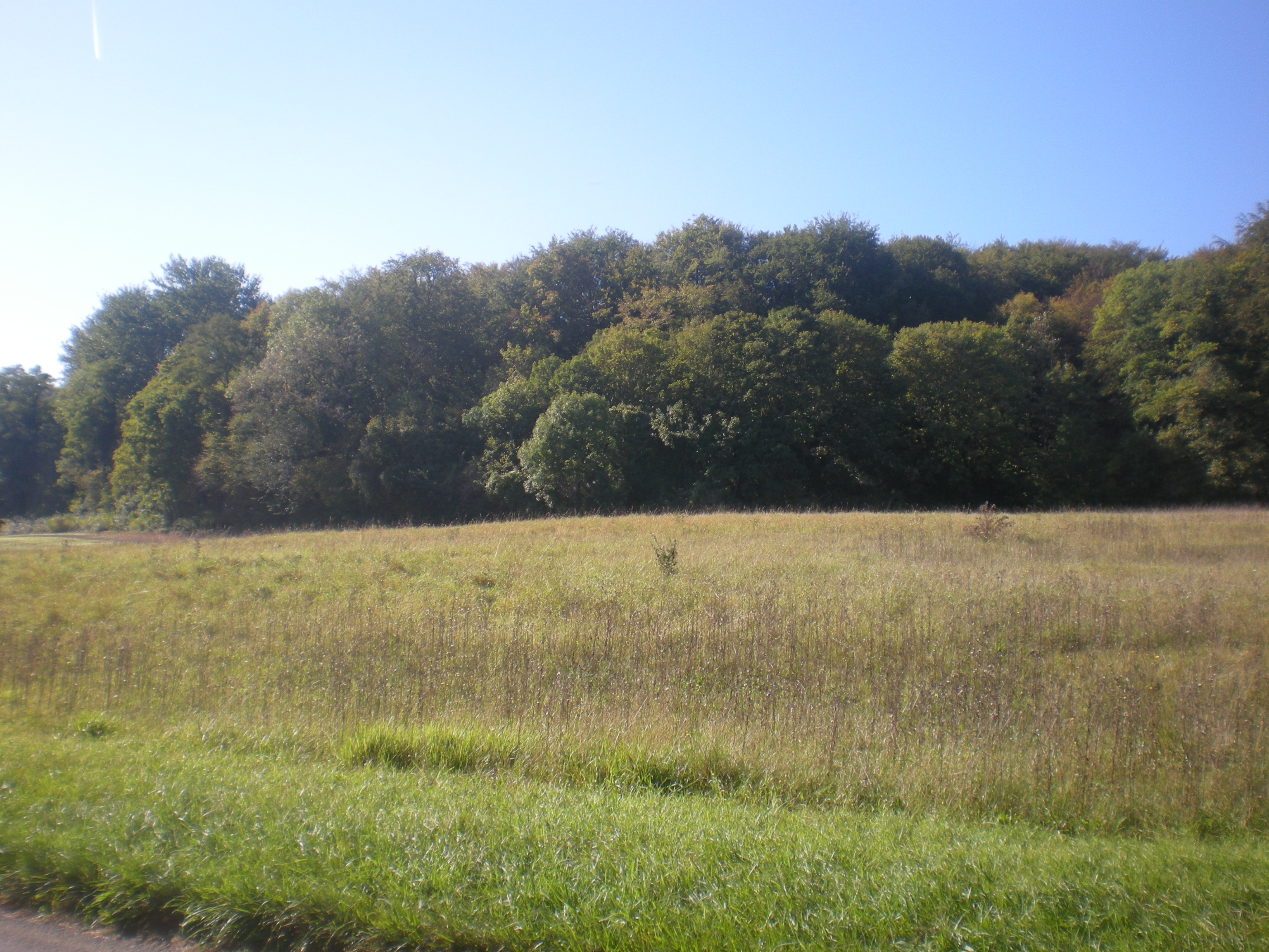 les cotaux de la vallée d'ansacq